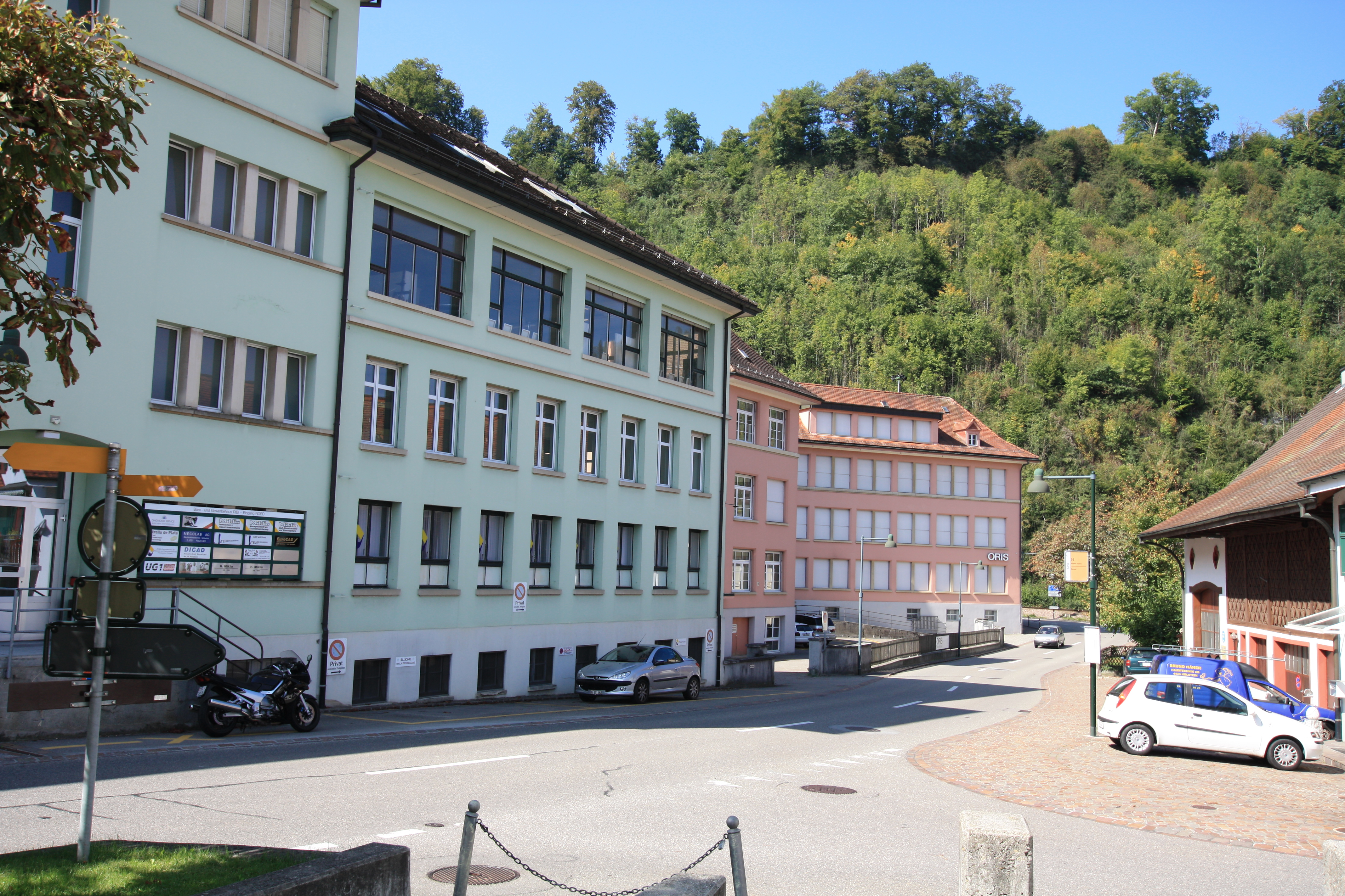 Verwaltung ORIS SA